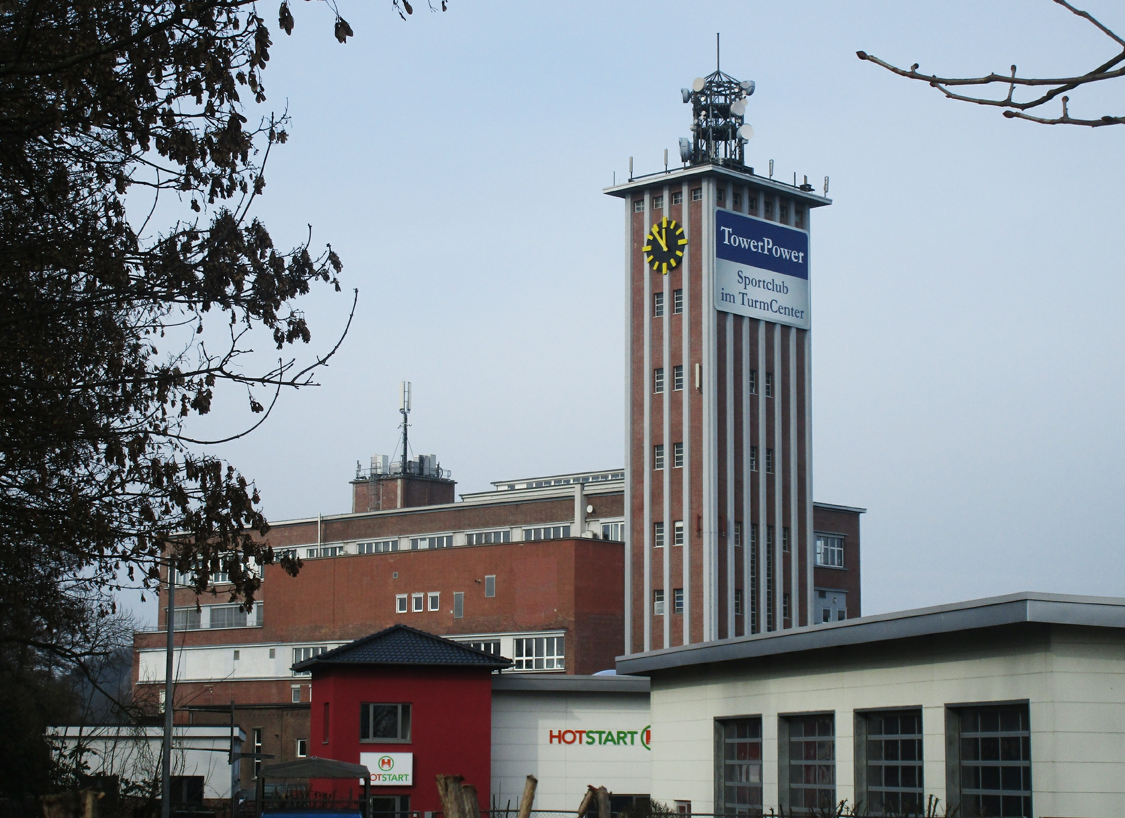 Der Turm der früheren Zellwolle-Werke Phrix der Rheinischen Zellwolle AG in Siegburg, Ansicht von der Wahnbachtalstraße aus (2017), ehemalige Fabrik der J. P. Bemberg AG, heute Gewerbegebiet und TurmCenter.